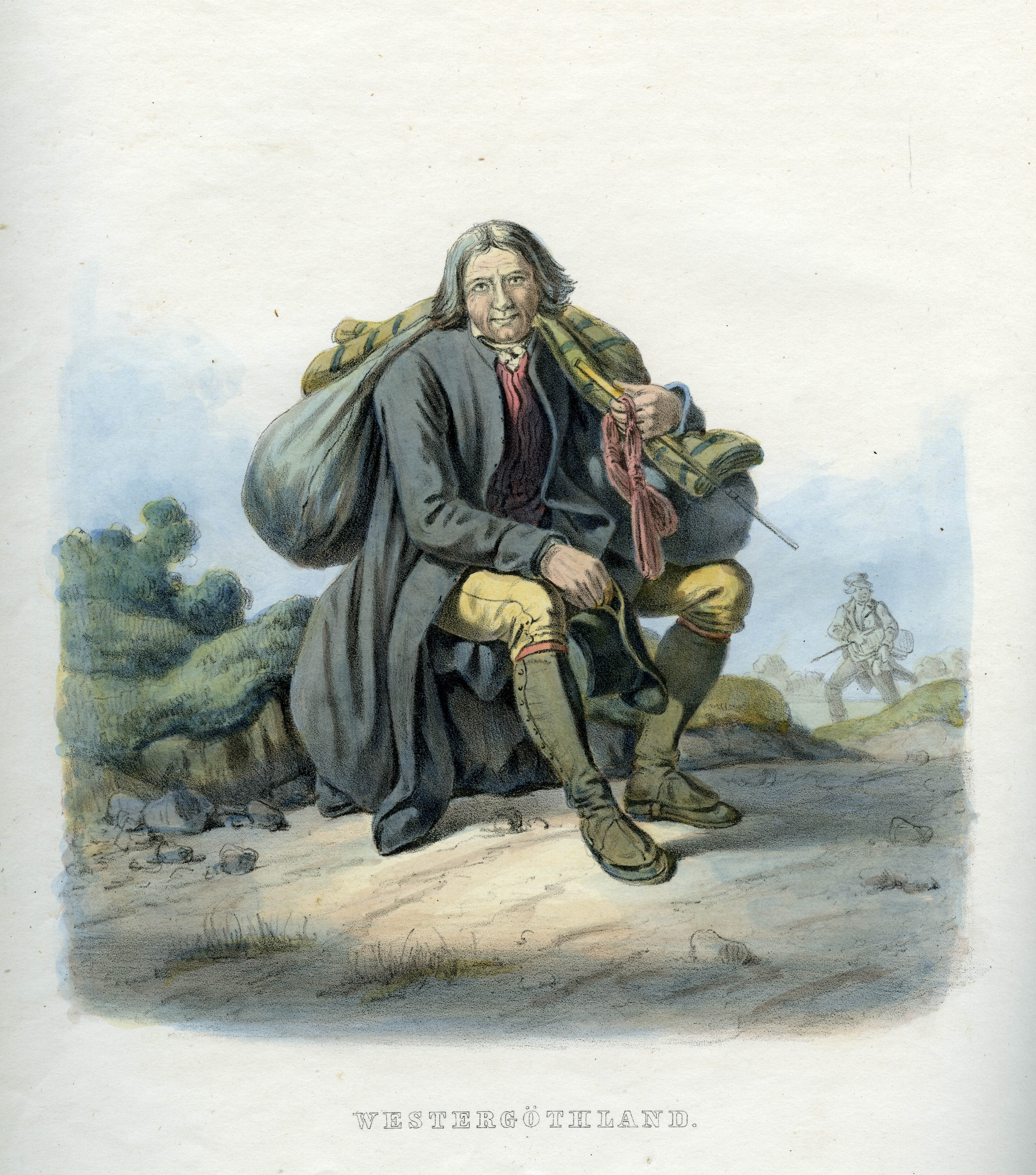 Folkdräkt från Västergötland, Sverige. Plansch ur Svenska folkets seder, bruk och klädedrägter (1863) tecknad av Carl Anders Dahlström.